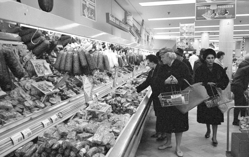 Einkaufen im Warenhaus (Kaufhof Bonn) 17.-20.1.1962